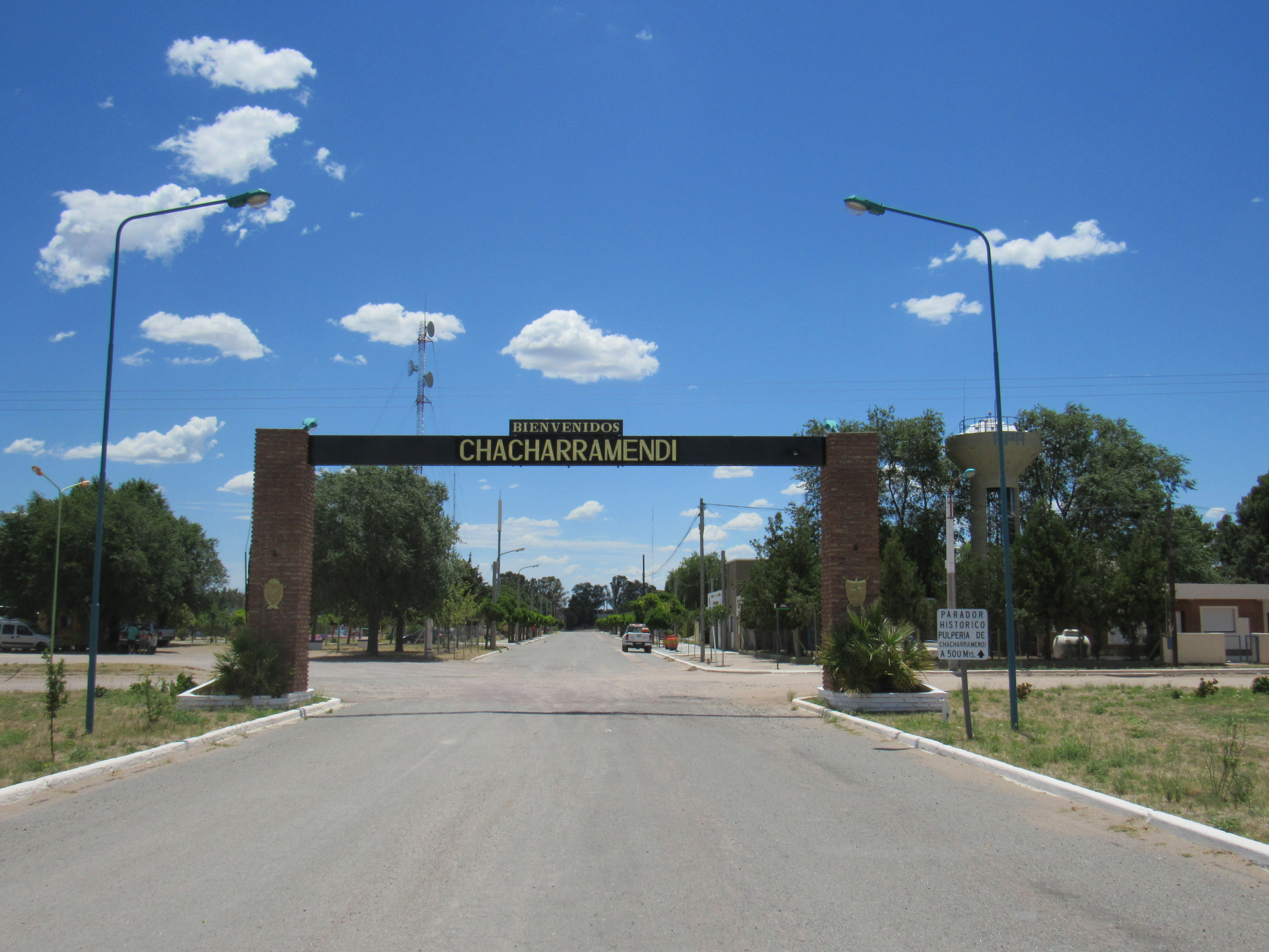 Entrada Chacharramendi, La Pampa